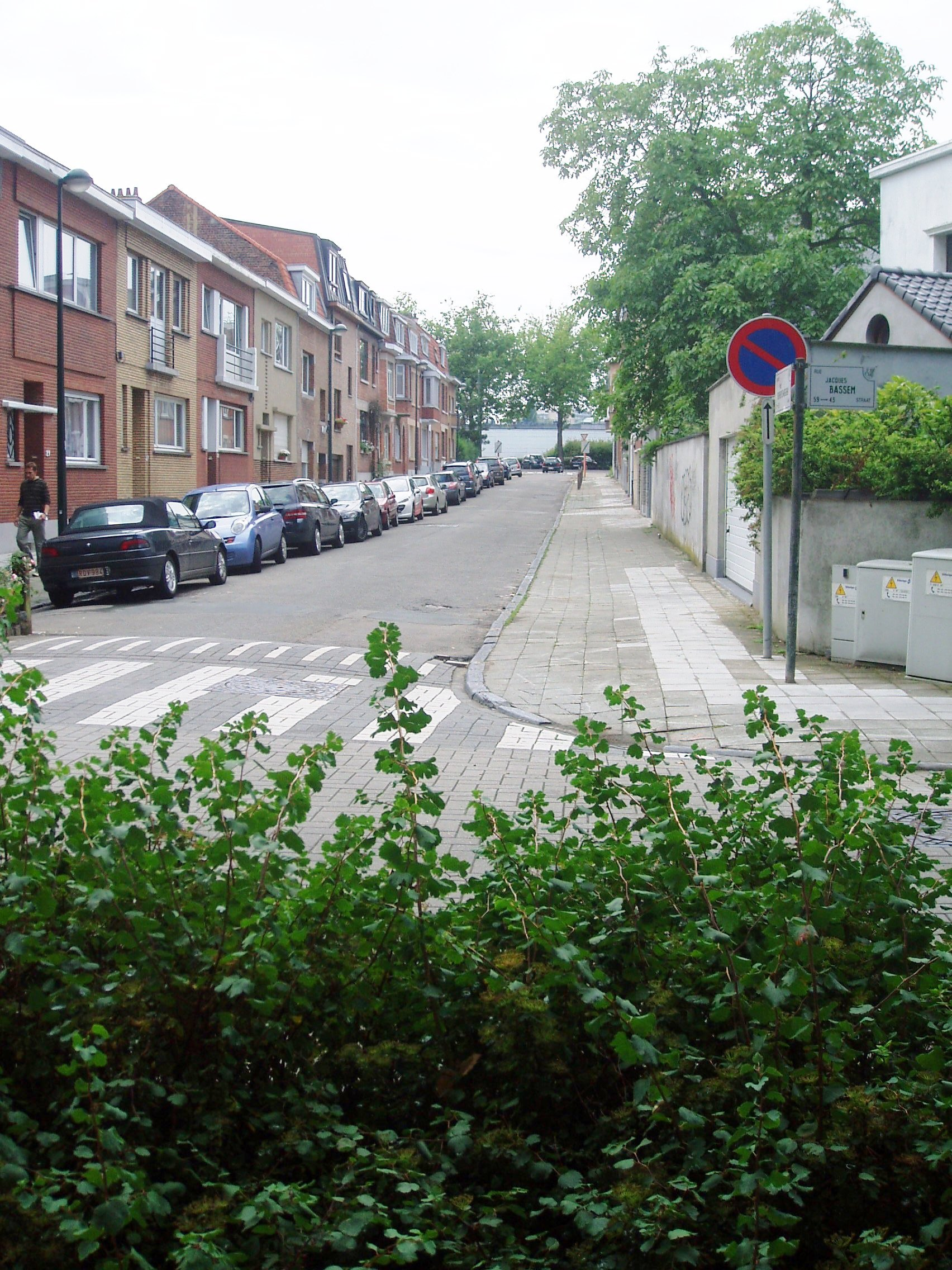 avenue Paul Verheyleweghen Auderghem Belgium